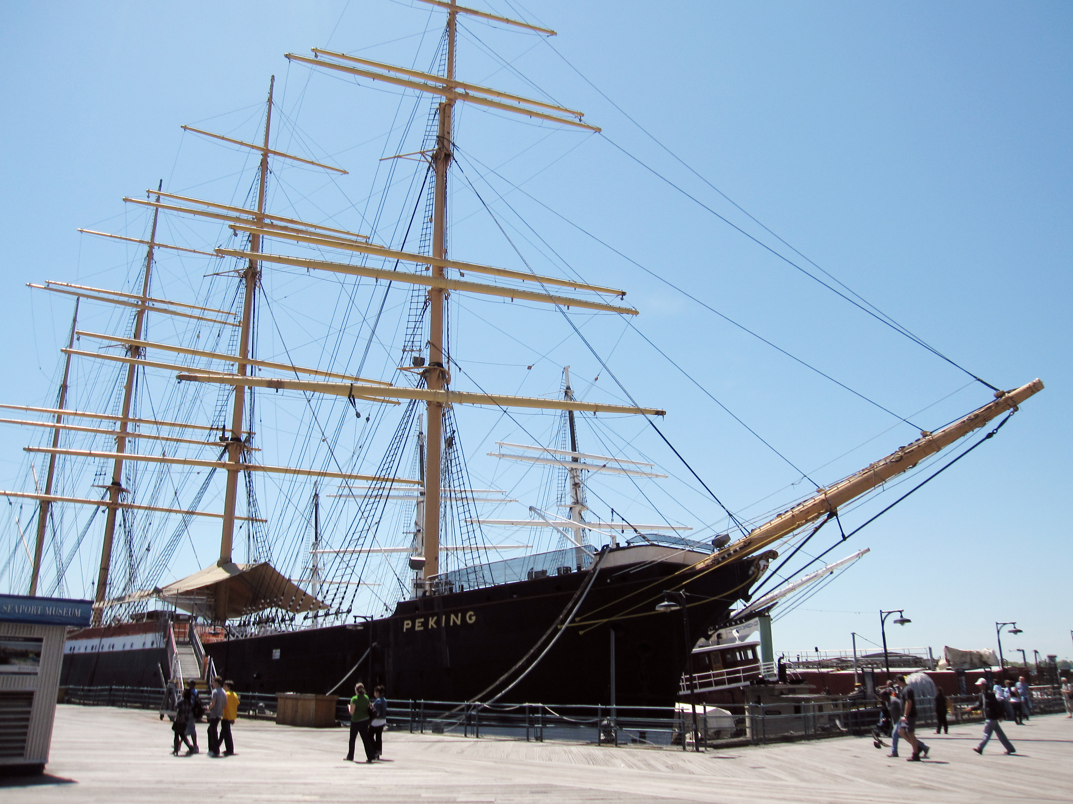 Peking (ship)